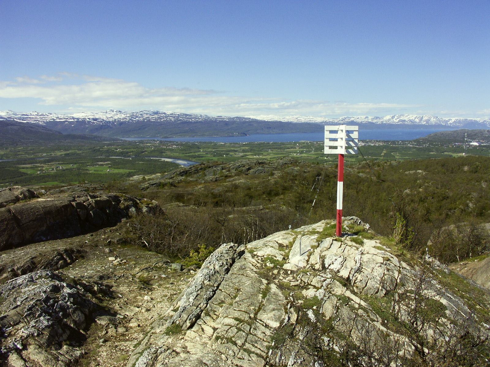 Struve Geodetic Arc (LILLE-REIPAS)